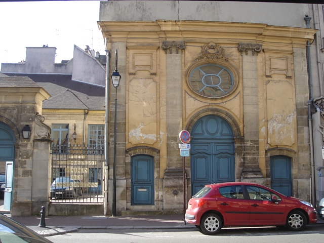 Ancien baillage, aile de droite l'ancien auditoire, Saint-Germain.